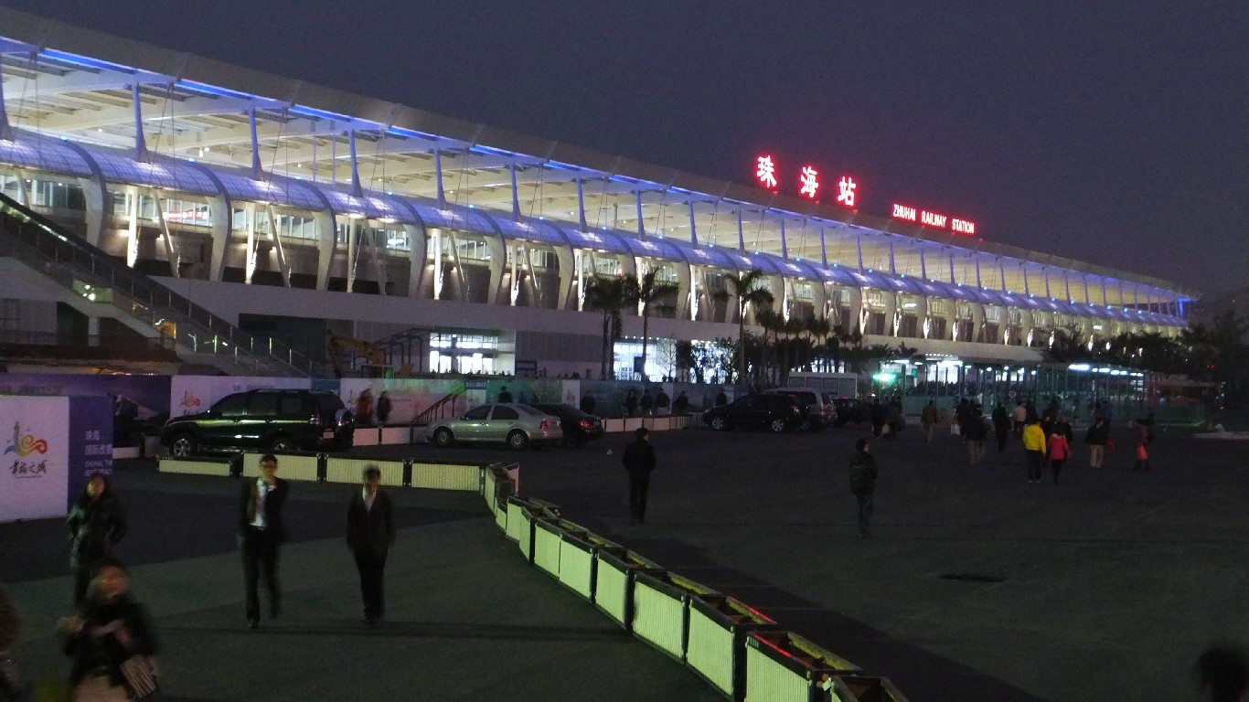 珠海站外觀